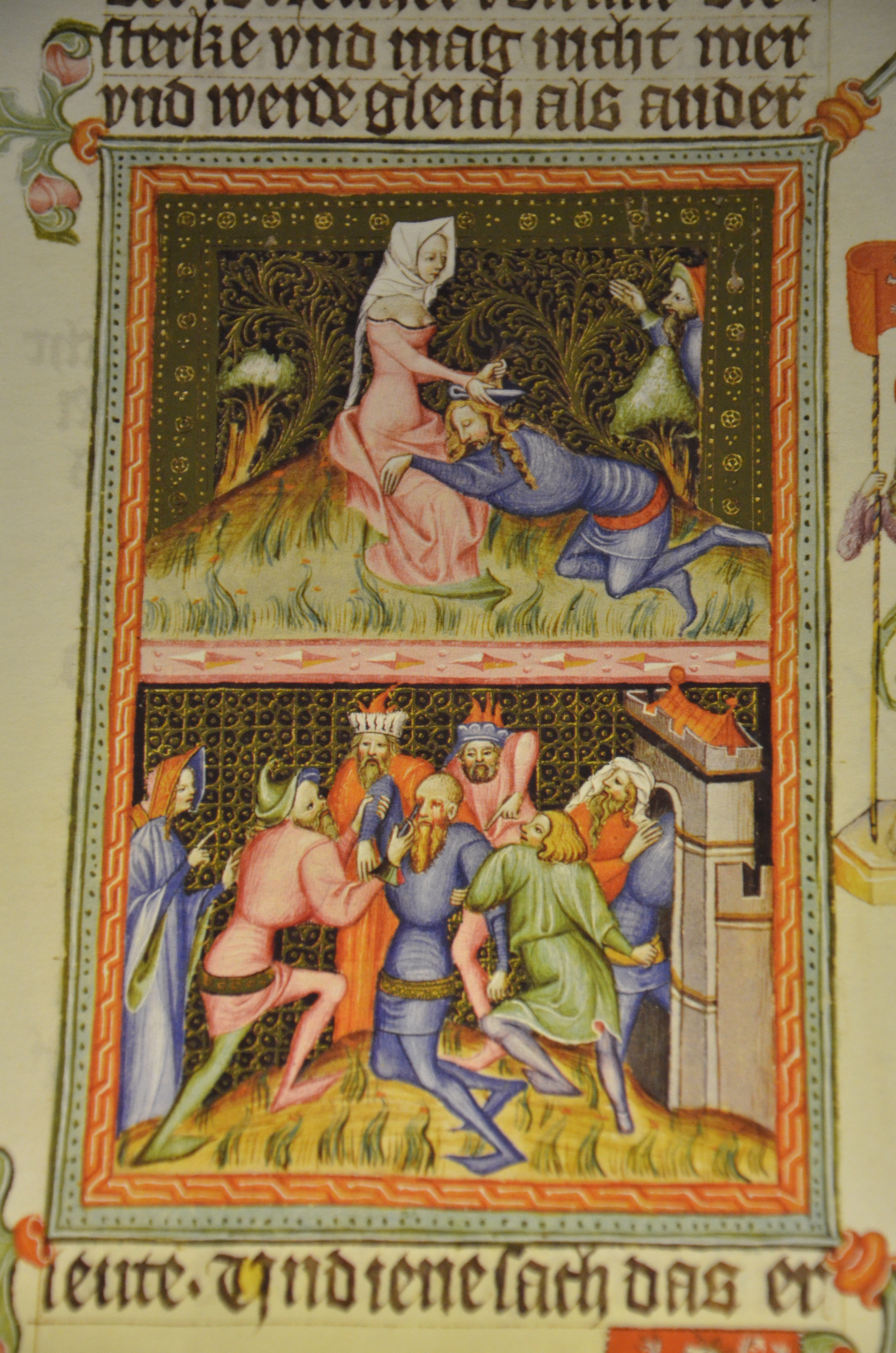 Iluminace z kopie bible Václava IV. (Křivoklát)